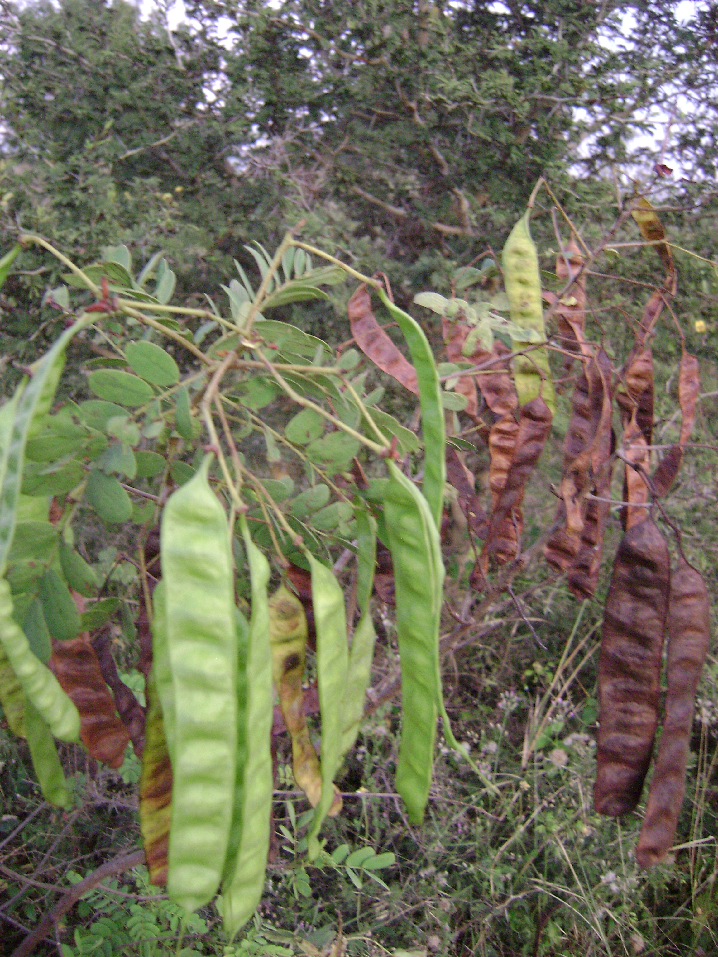 ஆவாரை இது சித்தமருத்துவத்தில் பயன்படுத்தபடுகிறது . ஆங்கில பெயர் :cassia senna தாவரவியல் பெயர் : cassia senna மருத்துவப்பயன் : தோல் வியாதிகளை குணப்படுத்தவும் பேதி மருந்தாகவும் பயன்படுகிறது .